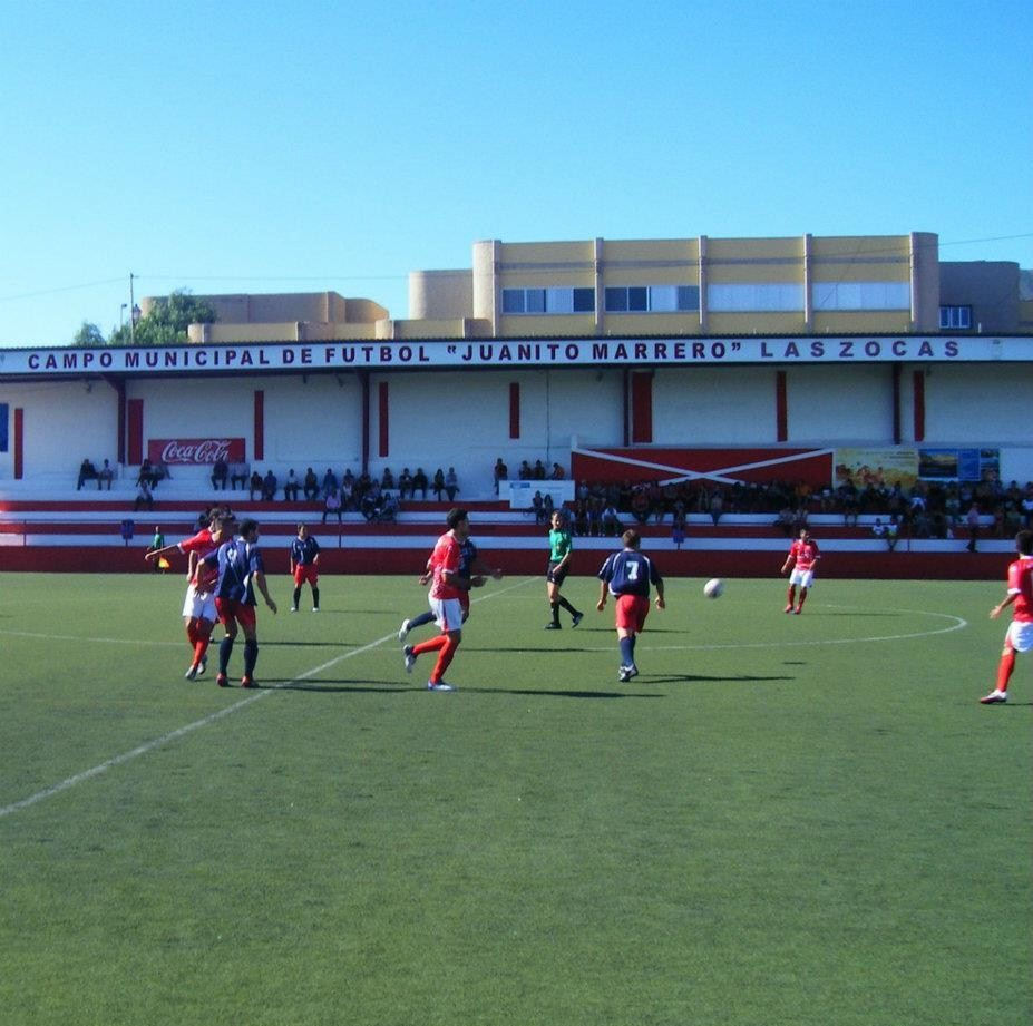 U.D.LAS ZOCAS 2 SAN ANDRES Y SAUCES 2 en el Juanito Marrero.